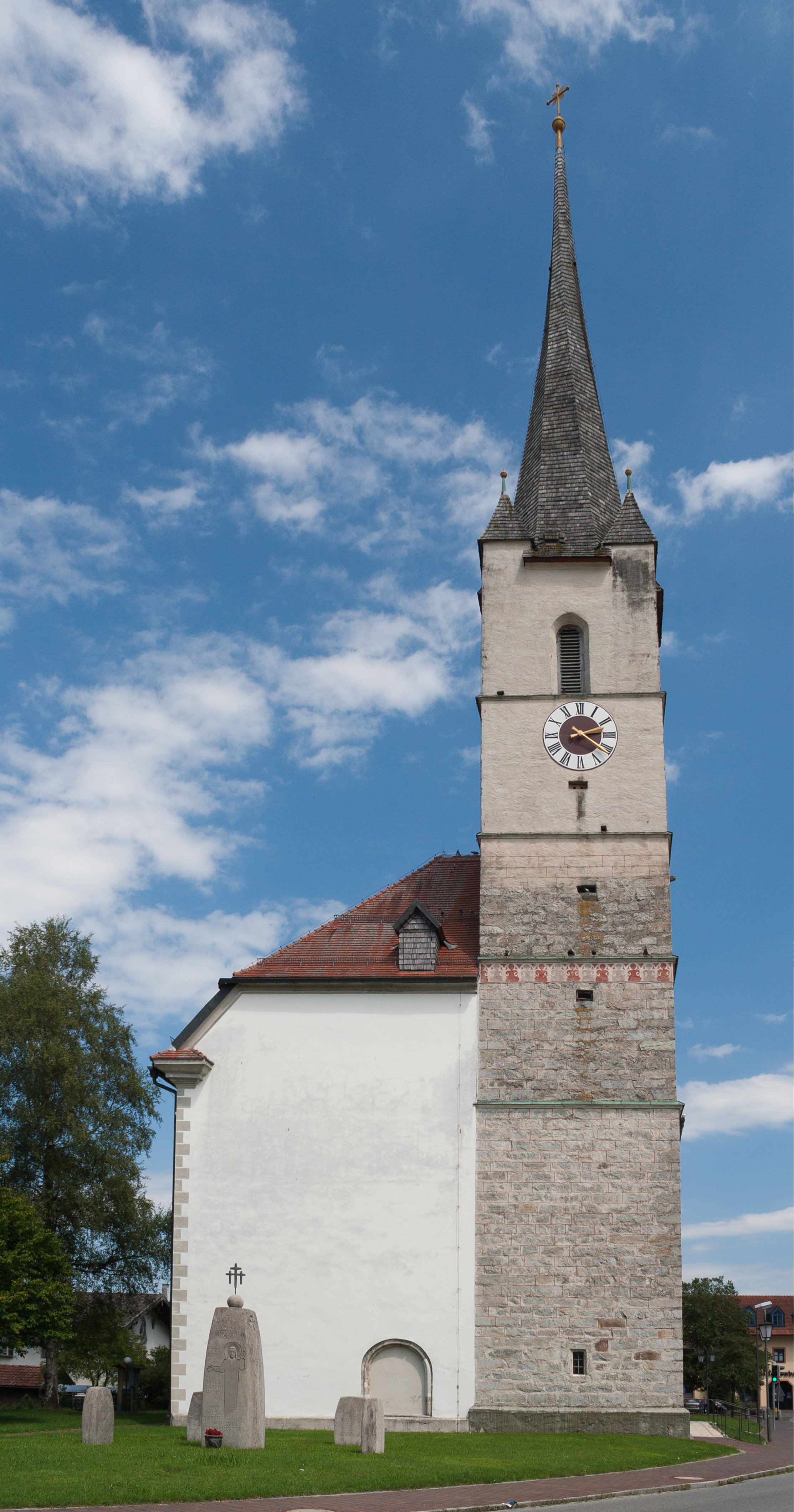 Halfing, Landkreis Rosenheim, Bavaria, Germany